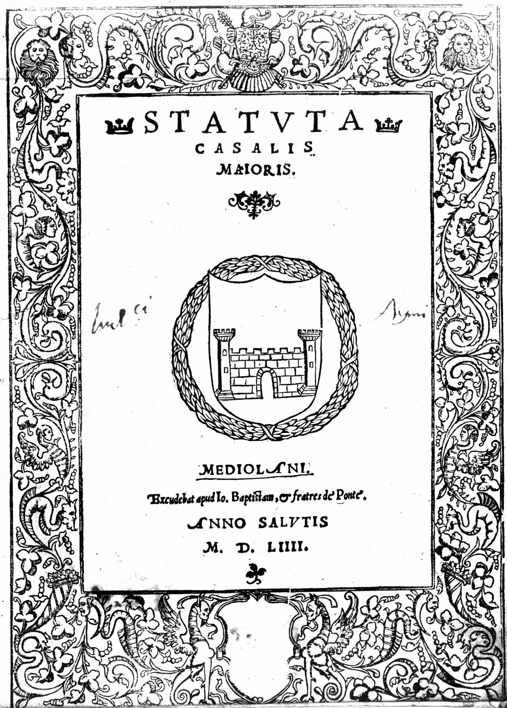 Frontespizio